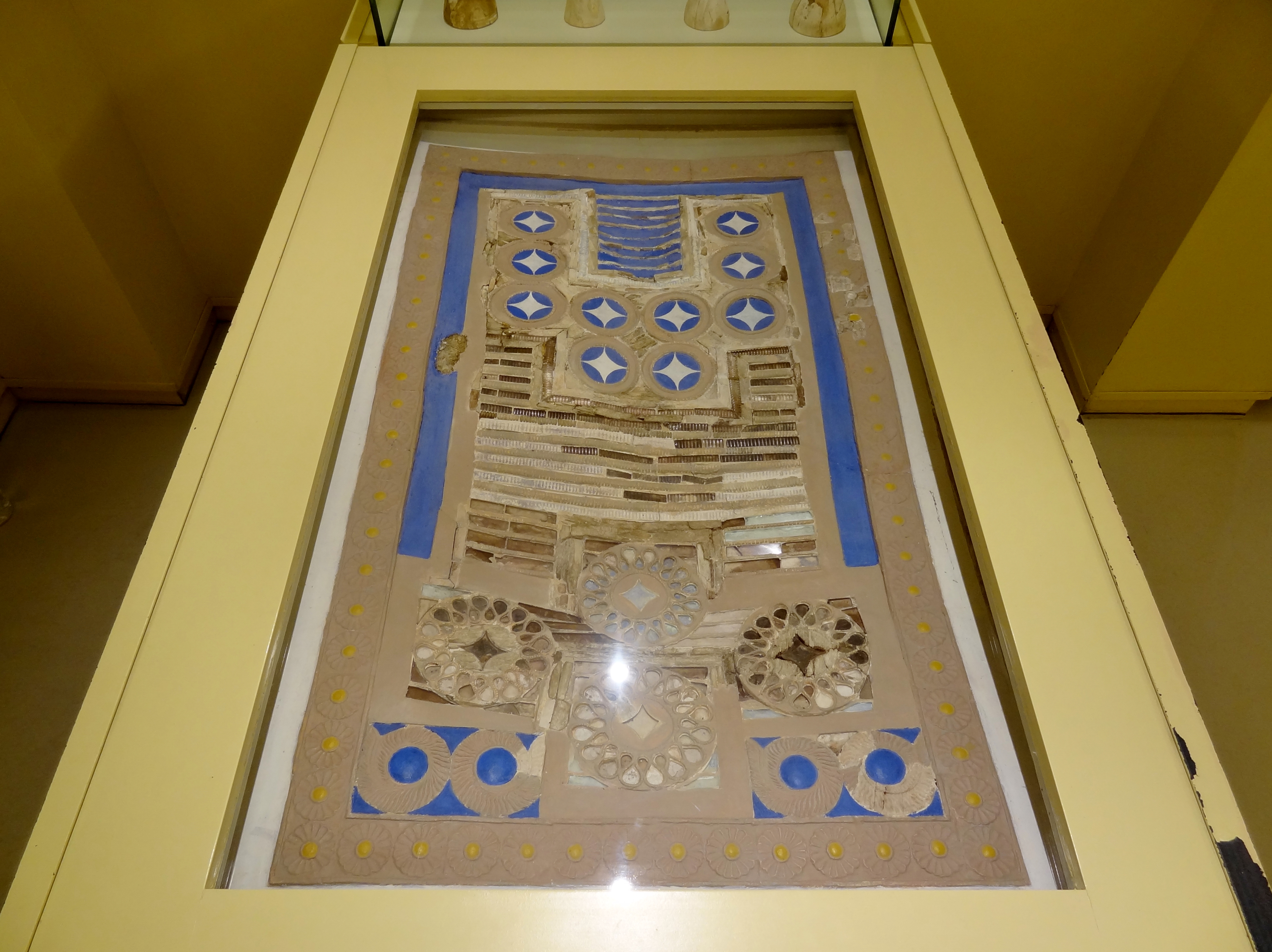 Minoisches Spielbrett und Spielsteine (Neupalastzeit, 1600–1500 v. Chr.) aus Knossos, ausgestellt im Archäologischen Museum Iraklio, Kreta, Griechenland